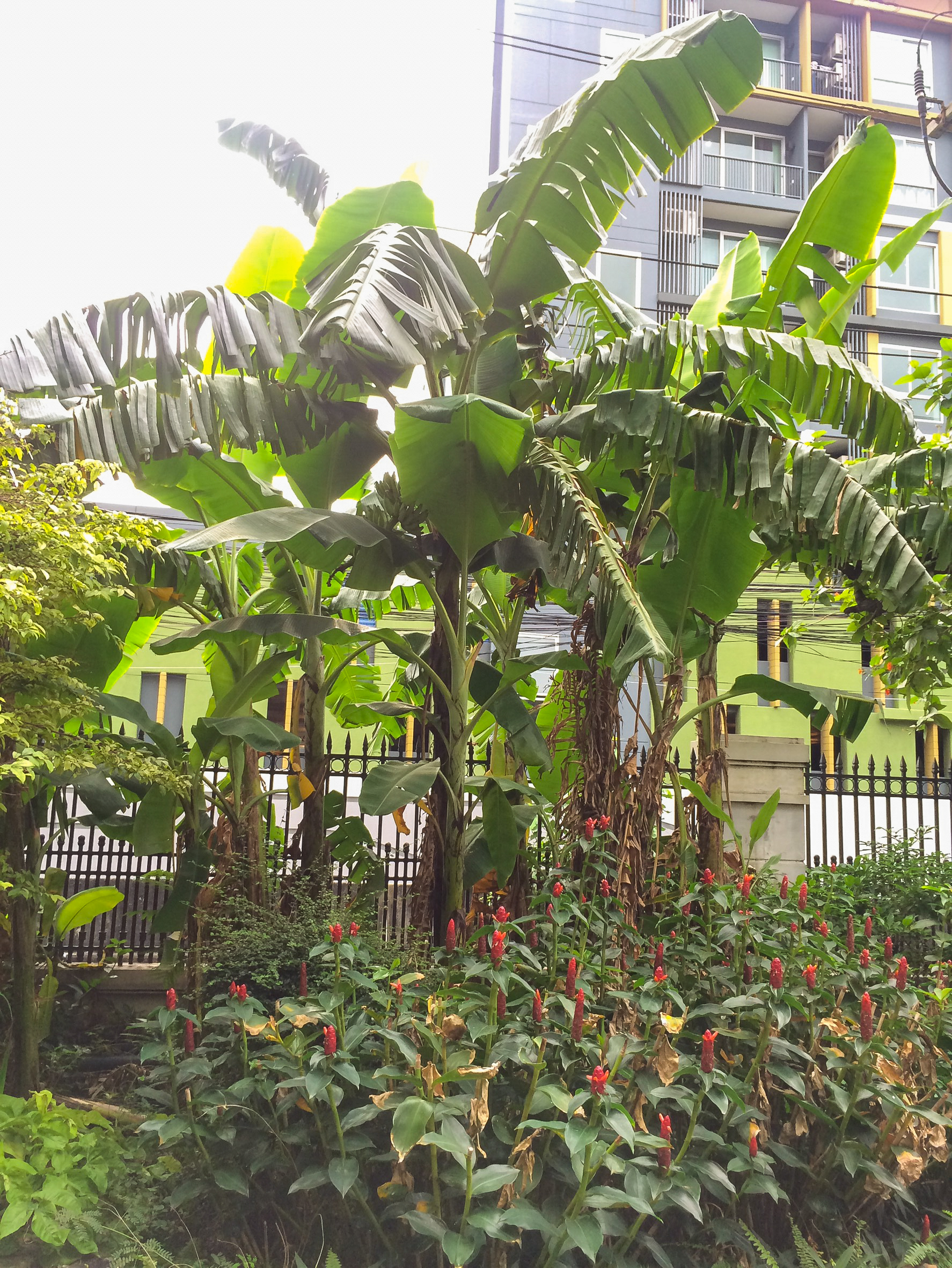 ต้นกล้วยน้ำไท ในพื้นที่มหาวิทยาลัยกรุงเทพ วิทยาเขตกล้วยน้ำไท